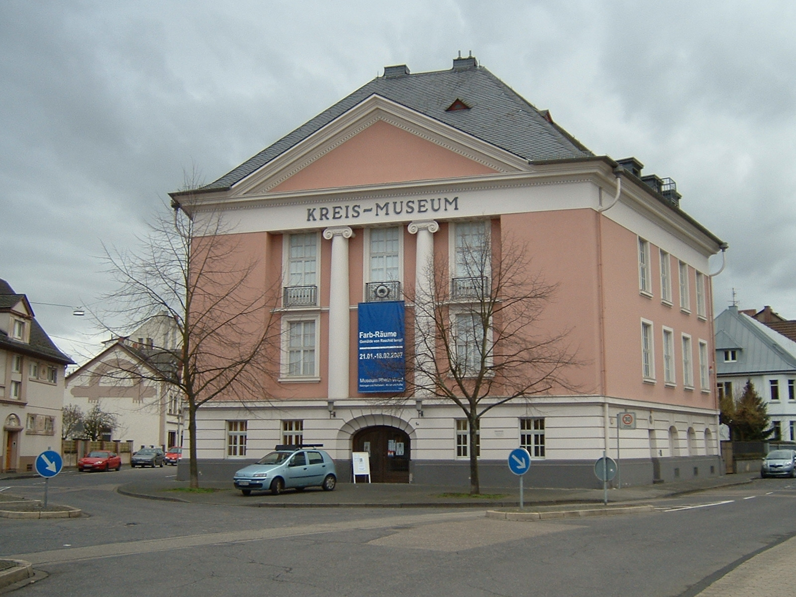 Kreismuseum Neuwied, "Röntgenmuseum"; erbaut 1928, unter Denkmalschutz